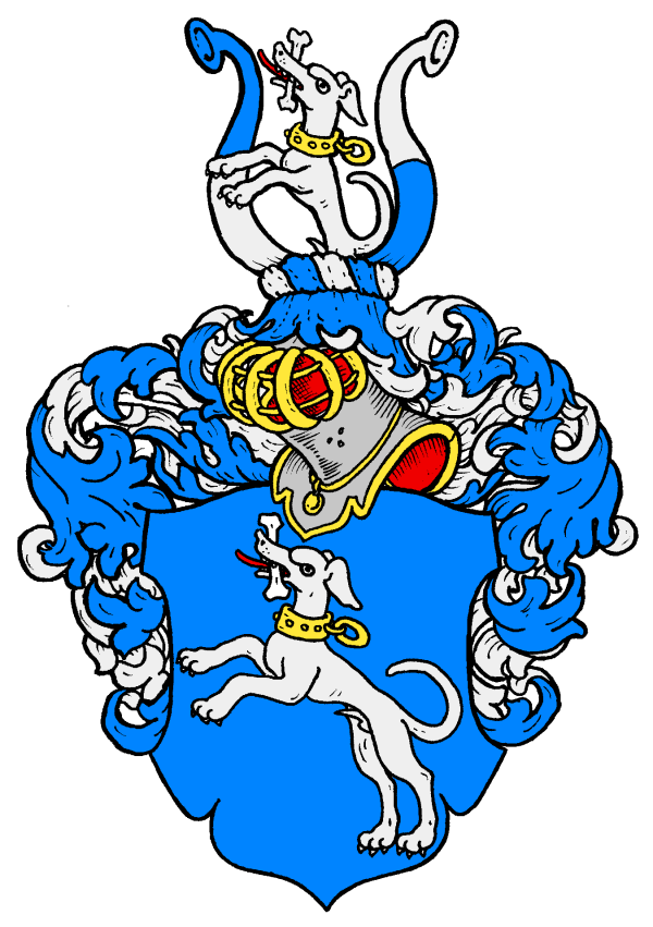 Armoiries de la famille allemande (von) Rodde. XVIe siècle.